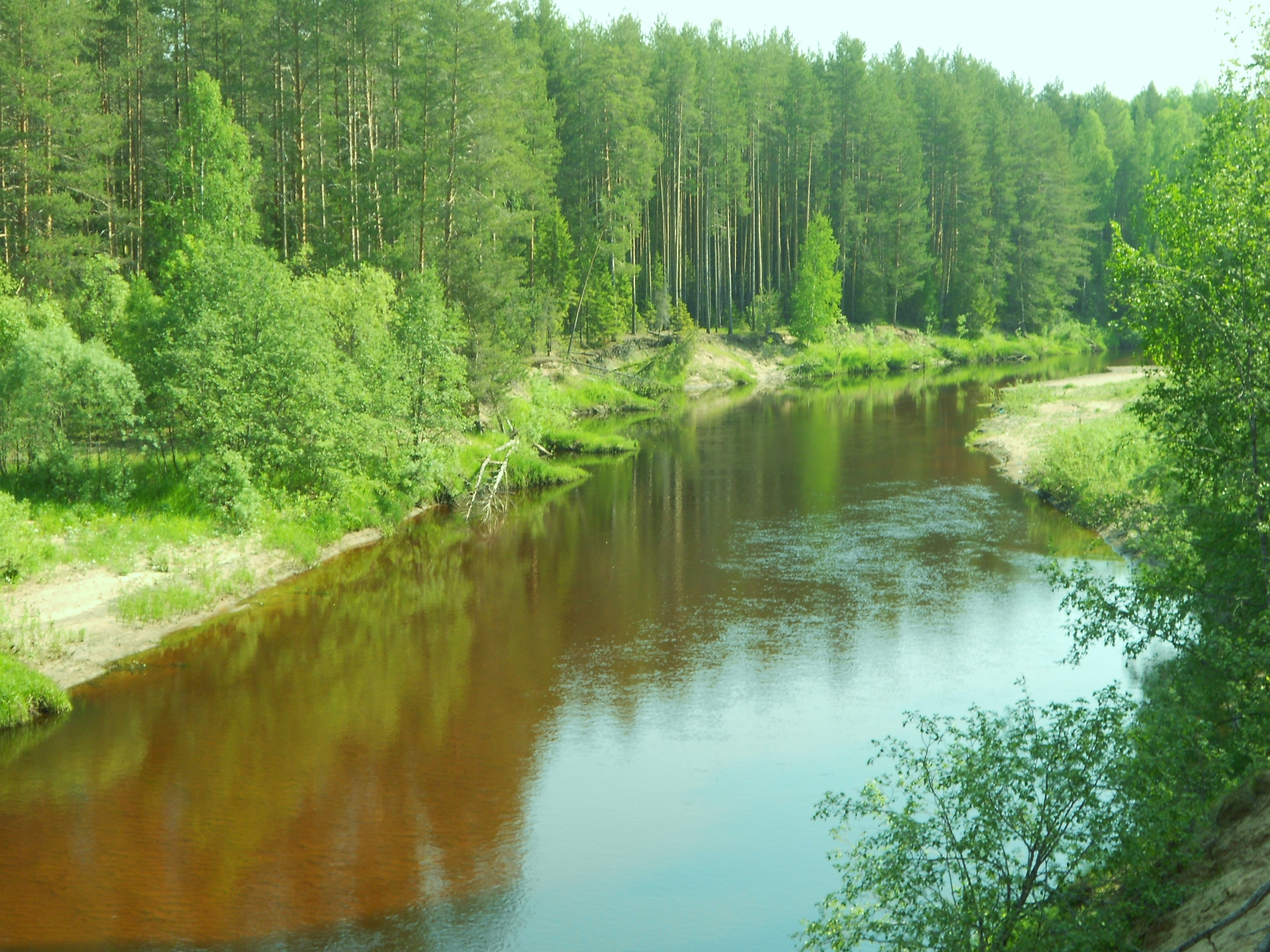 Никольская церковь (Архангельская область, Котлас, ст. Гарь Новая)